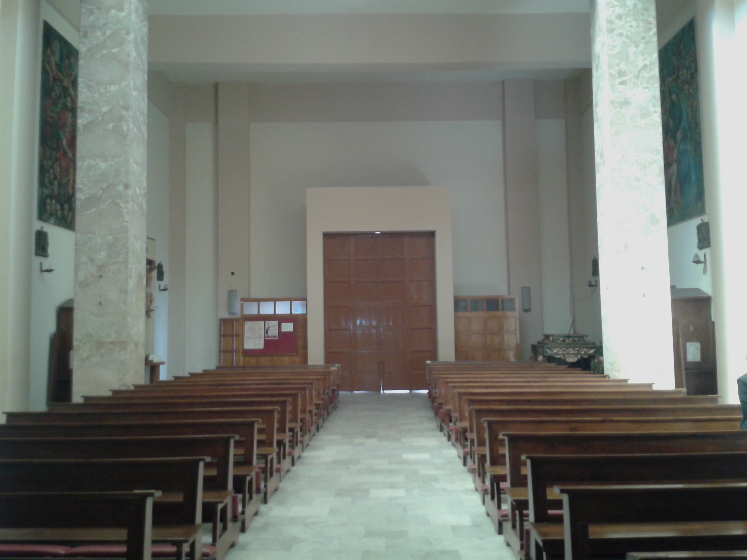 Interno chiesa Immacolata e San Rocco di Palmi